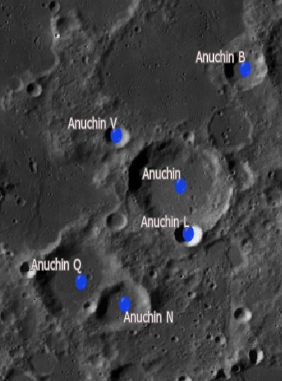 Cráter lunar Anuchin. Cráteres satélite. (Imagen LRO)